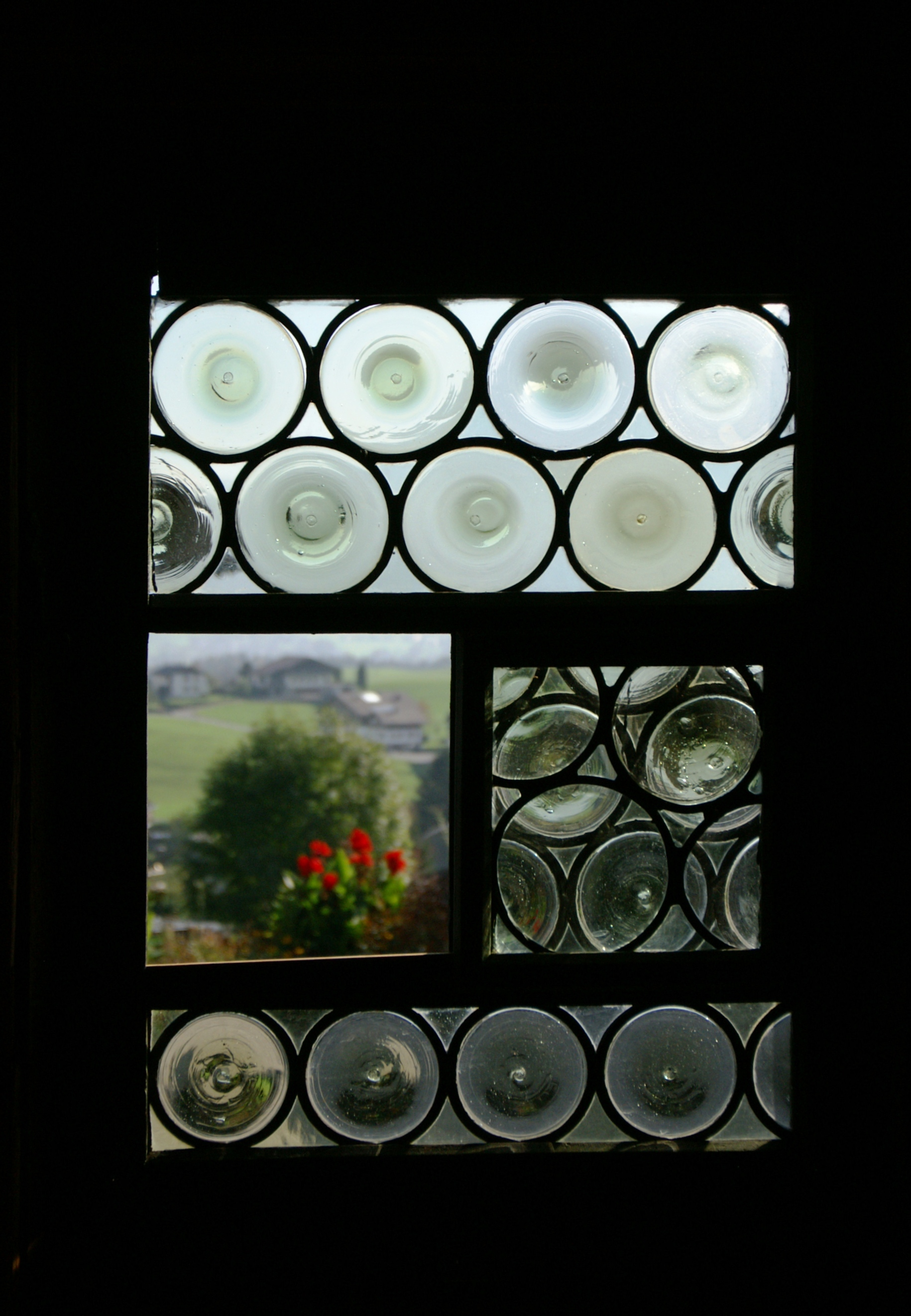 Angelika Kauffmann-Museum in Schwarzenberg im Bregenzerwald